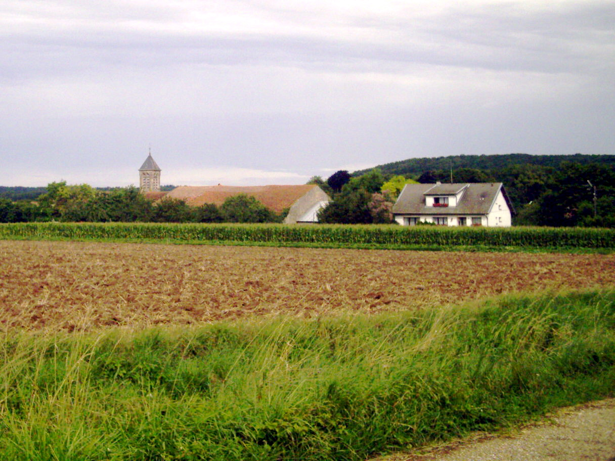 Juvrecourt depuis la route de Réchicourt-la-Petite